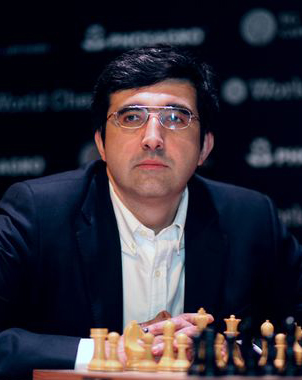 Владимир Крамник, Турнир Претендентов 2018